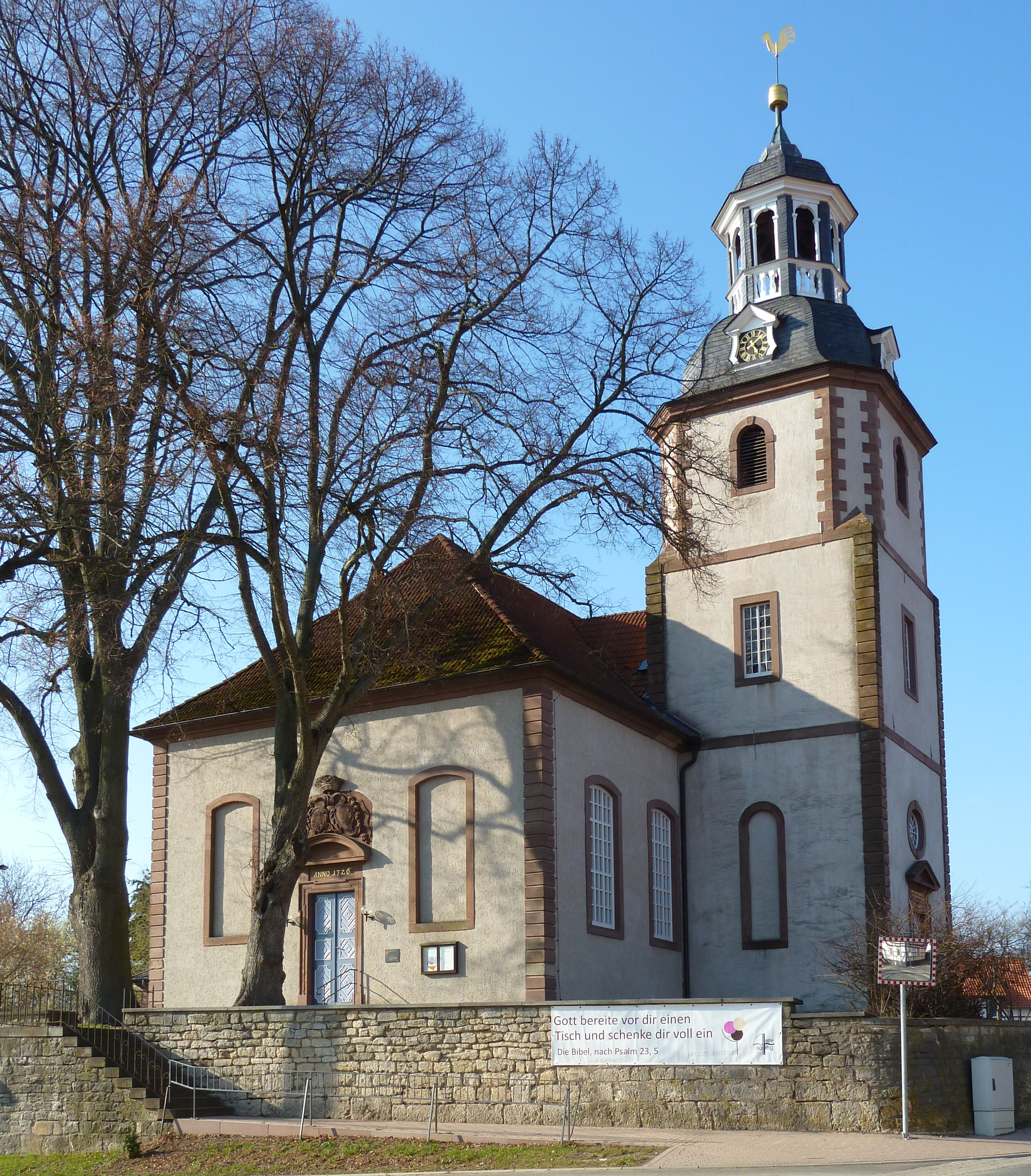 Die ev.-luth. St.-Marcus-Kirche in Imbshausen, Stadt Northeim, Niedersachsen. Erbaut 1725–30 nach Entwurf des Hofbaumeisters Johann Christian Böhm